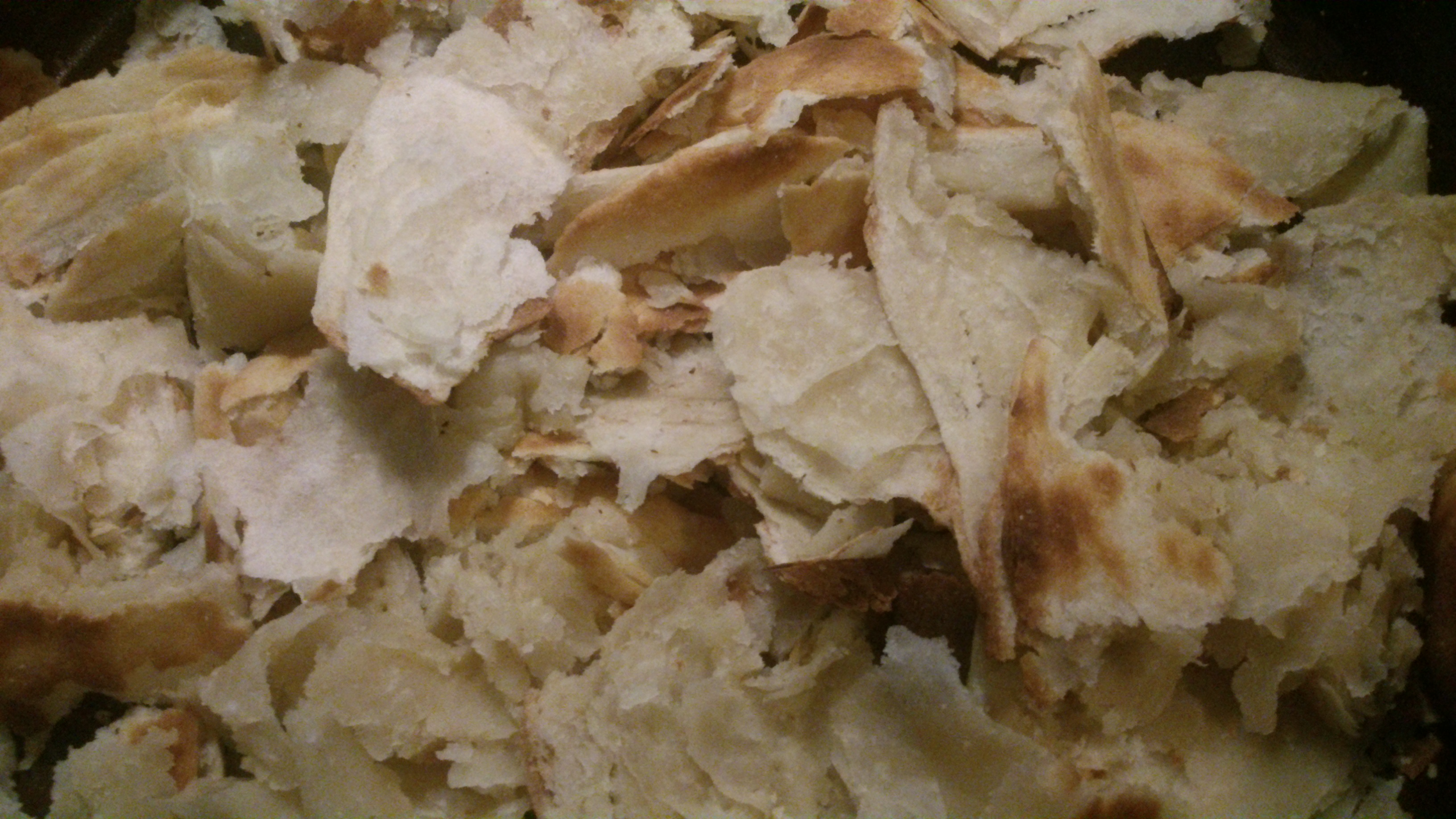 Топеница. Јадење карактеристично за тетовскиот крај